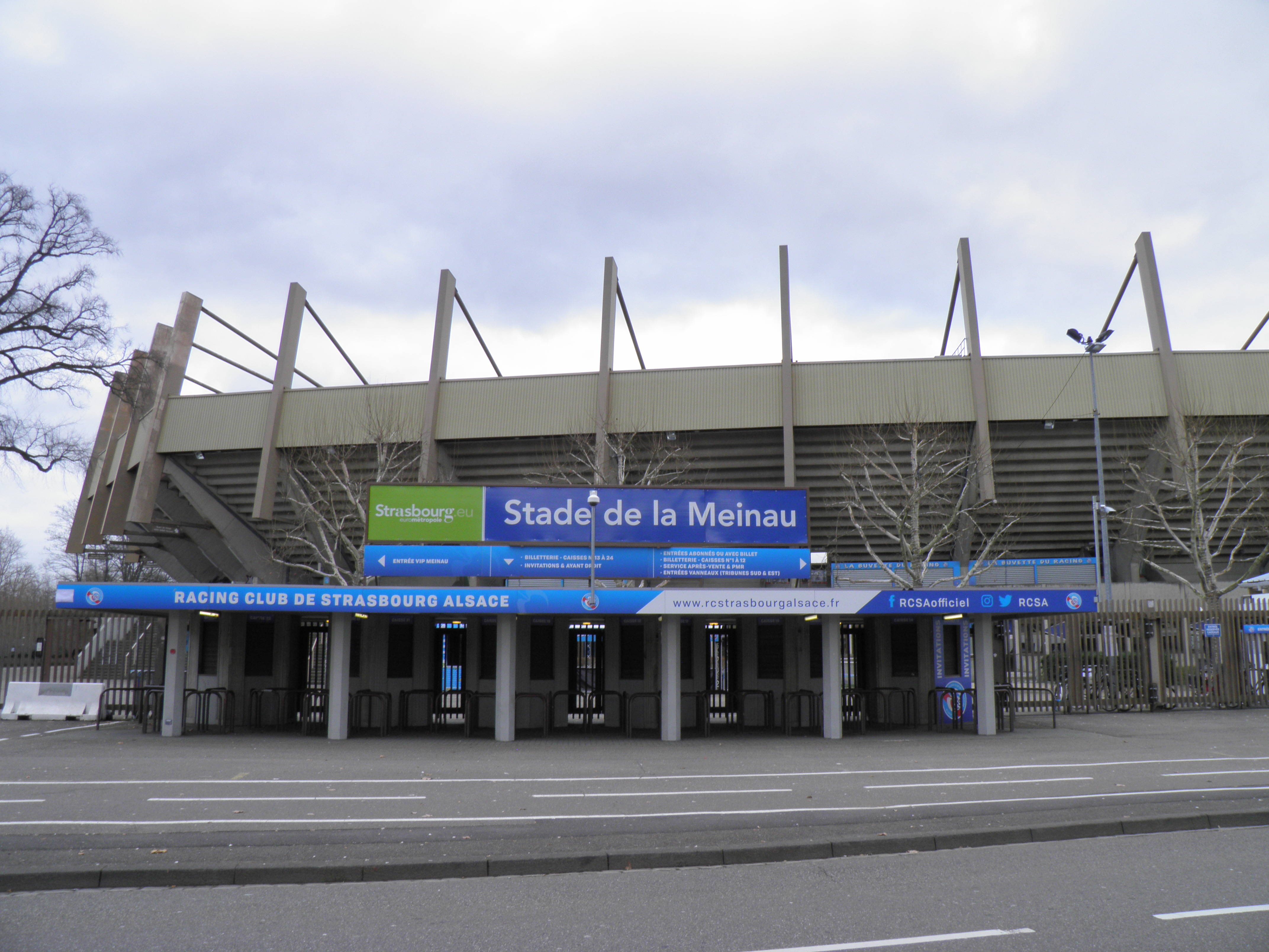 Entrée du stade de la Meinau à Strasbourg (Bas-Rhin, France).